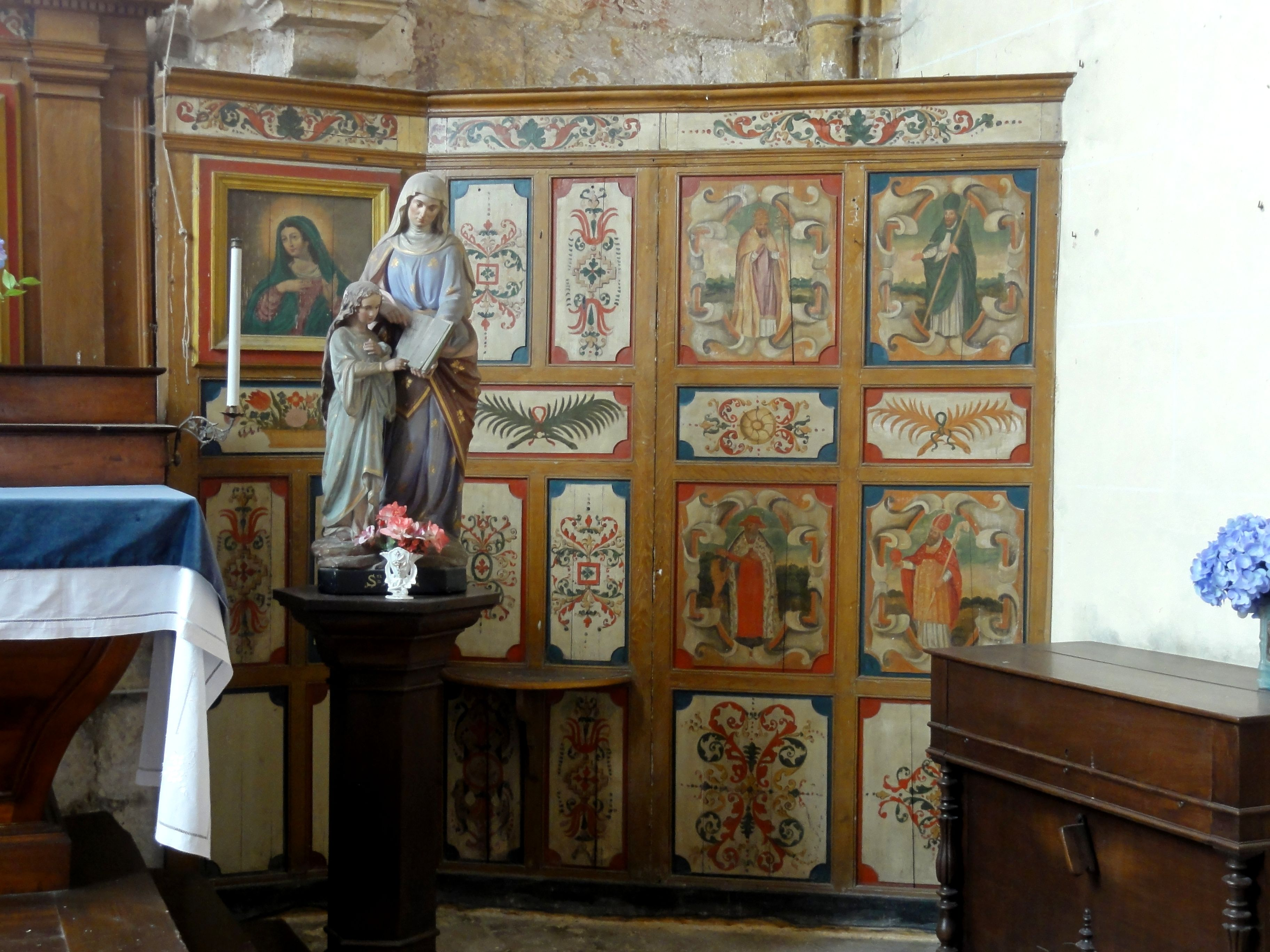 Retable du chevet, côté droite.